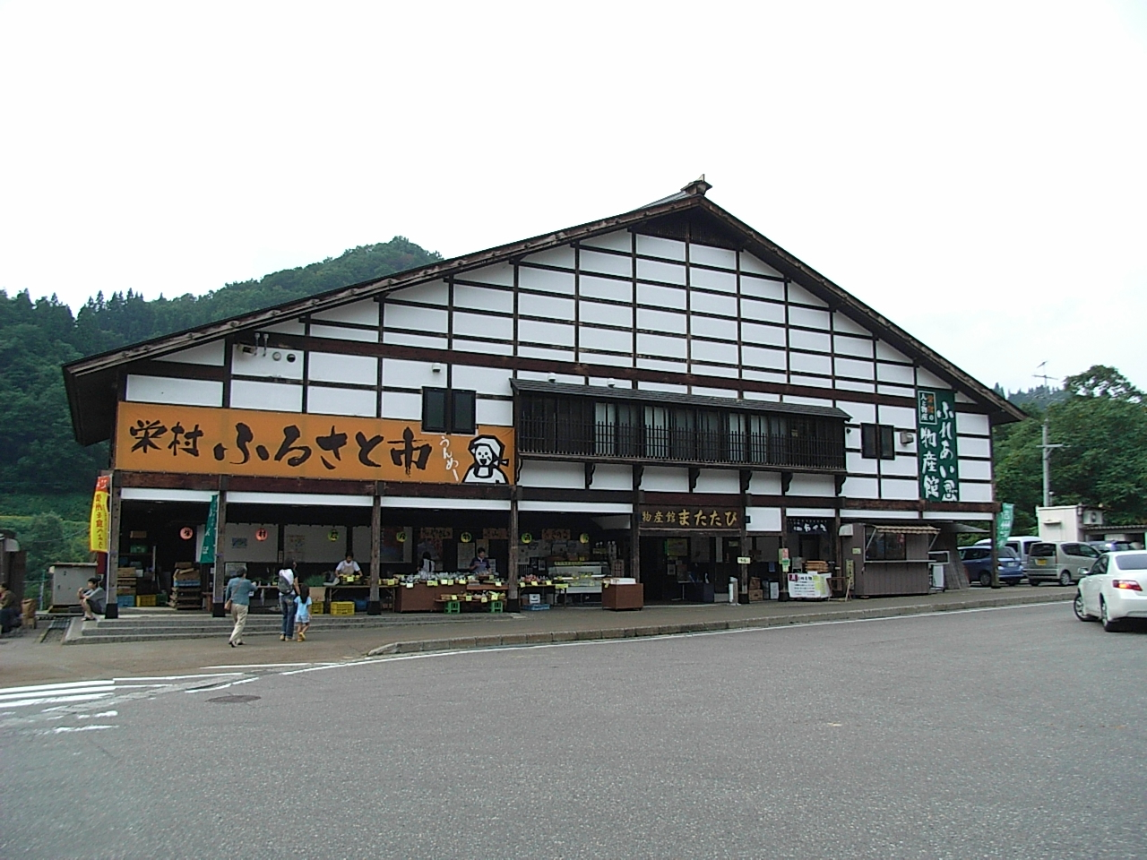 Michinoeki Shin-etsusakae (Nagano) (道の駅信越さかえ)